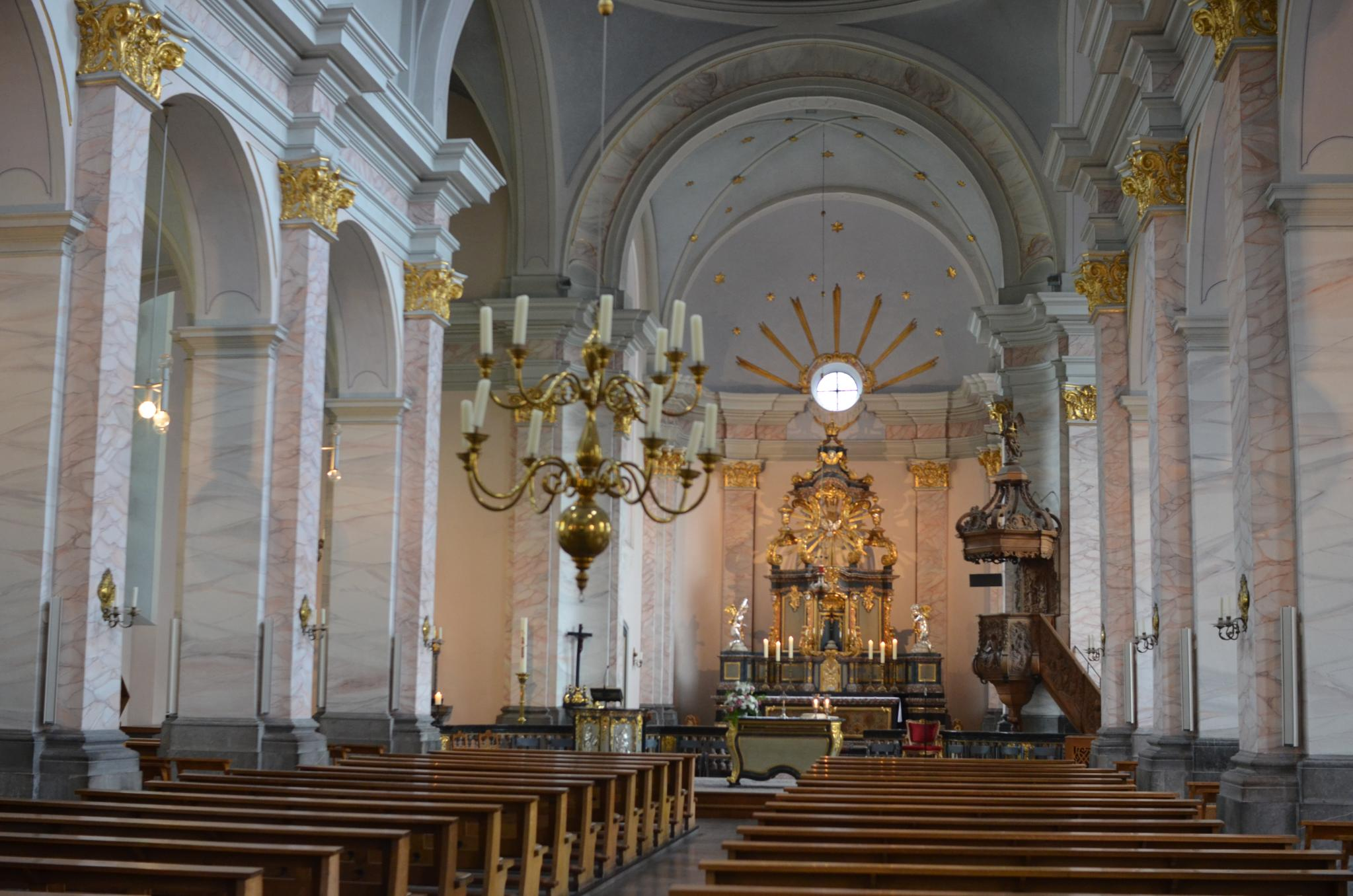 St. Michael